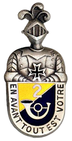 Insigne régimentaire du 2e régiment de chasseurs d'Afrique